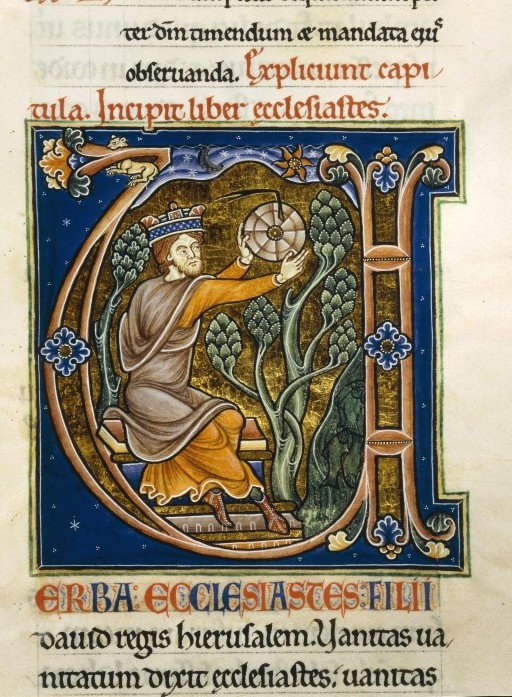 Image tirée du manuscrit Bible des capucins, originaire de Champagne en France, vers 1170-1180 animal, arbre, astre, astrolabe, banc, ciel, couronne, cours d'eau, eau, enluminure, étoile, lettrine, nuit, planète, poisson, roi, Salomon, végétation